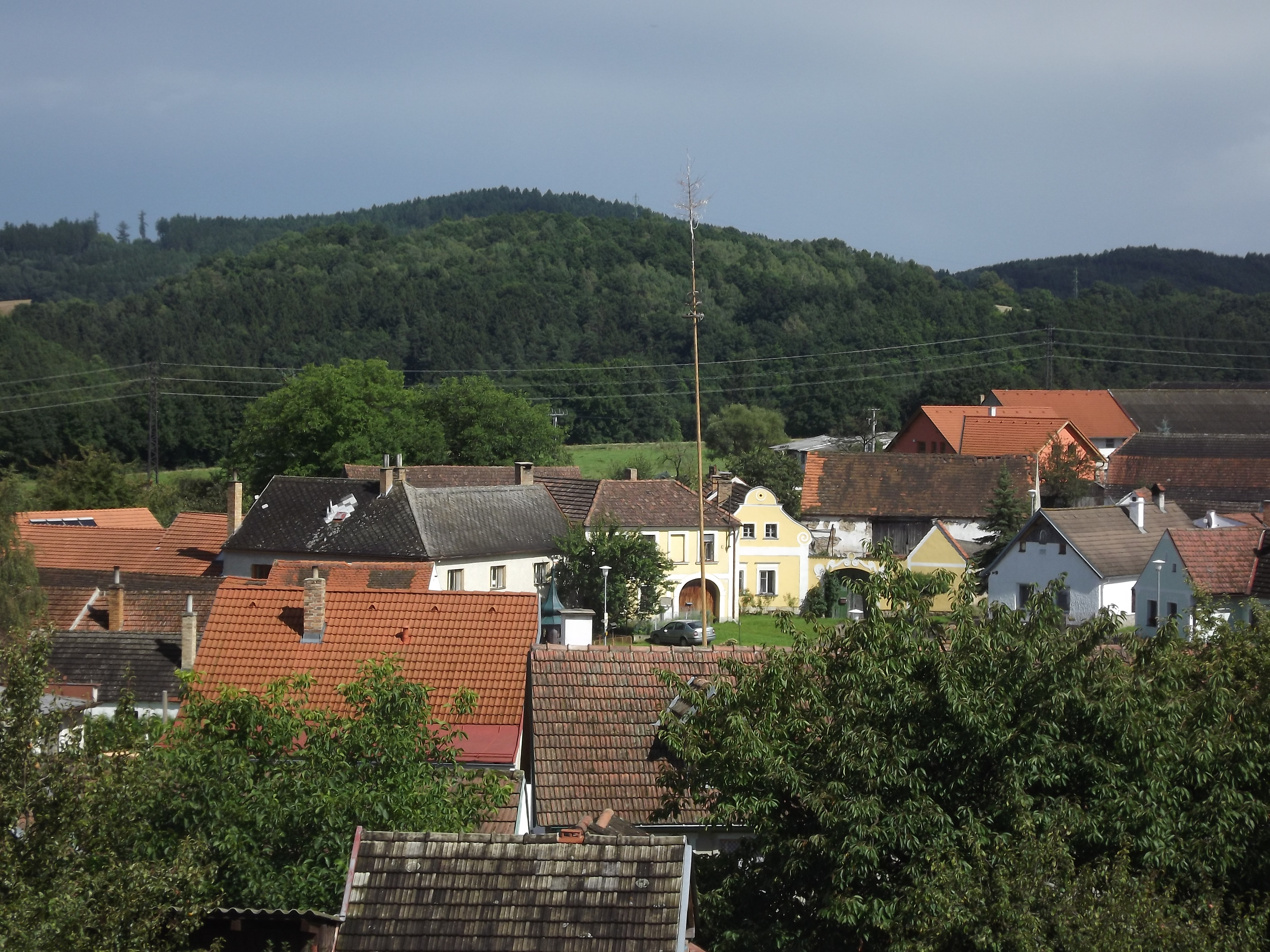 Plešovice od železniční stanice